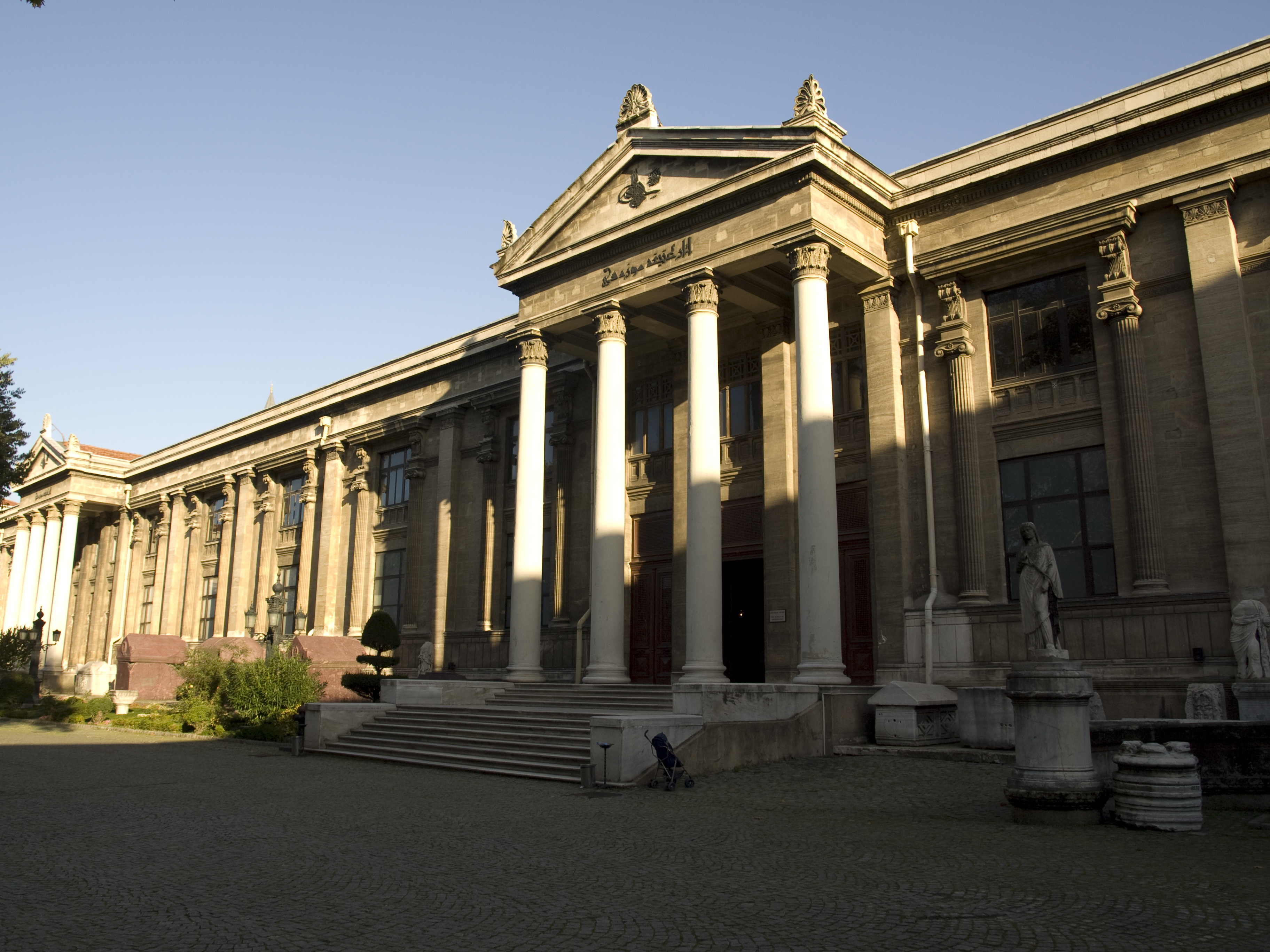 PB076001raw Istanbul, Turkey